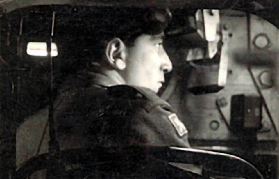 Jan Horal